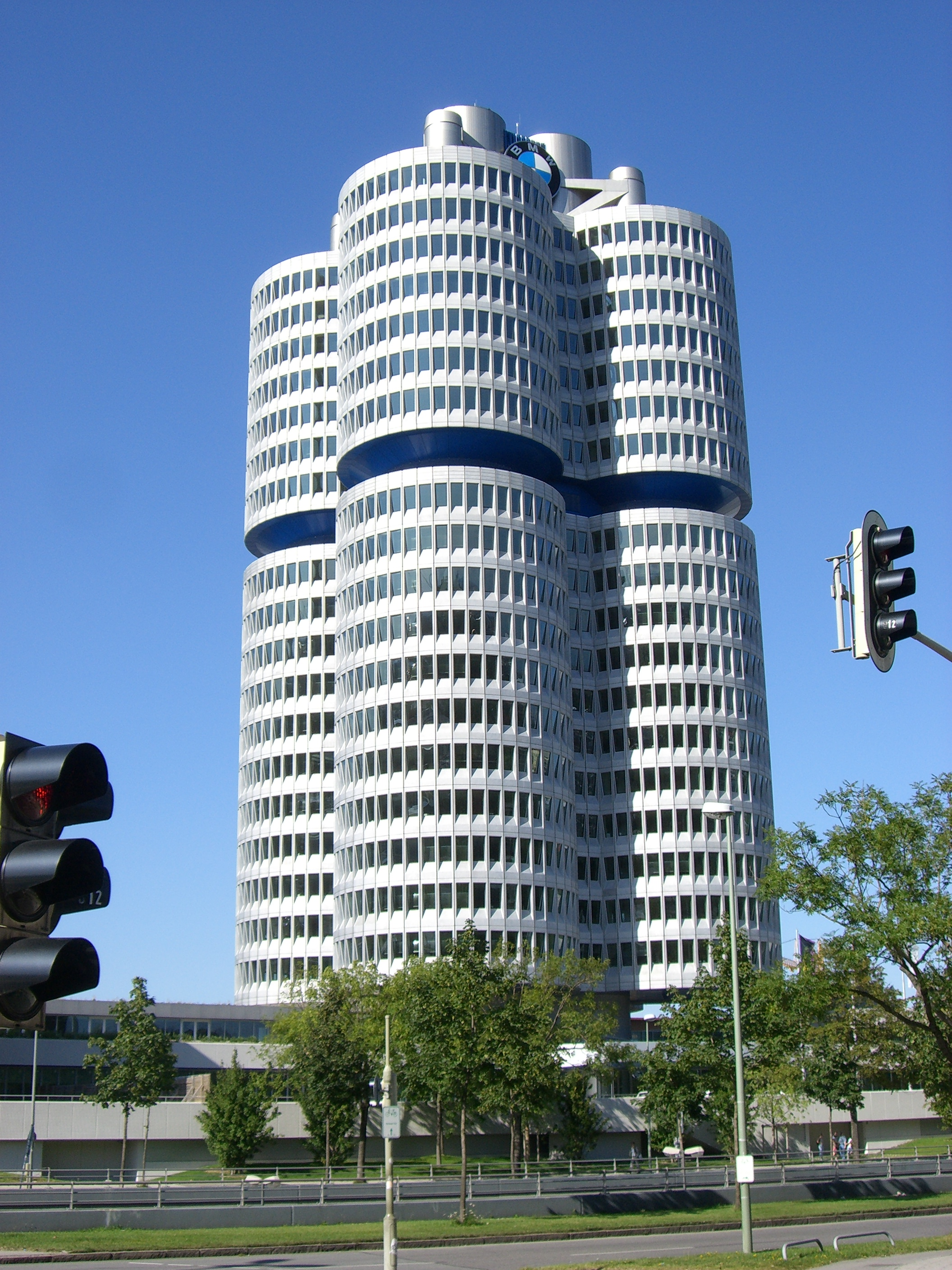 BMW headquarter in Munich, Bavarian